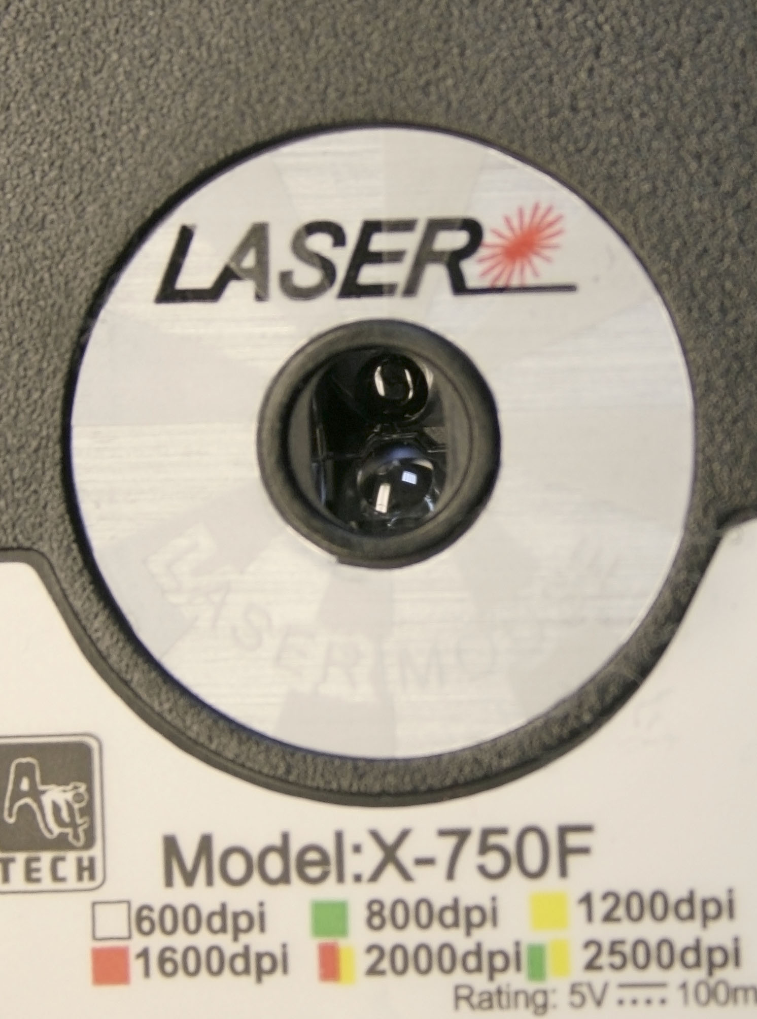 Laser mouse motion detector